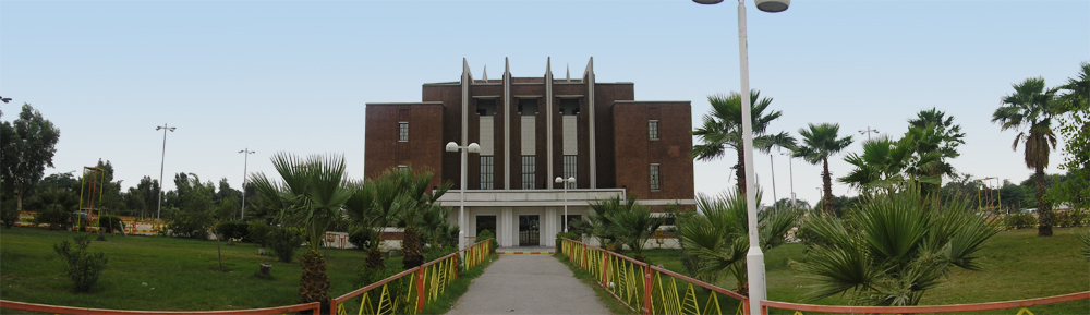 Taj Cinema, Abadan - Iran(Persia).